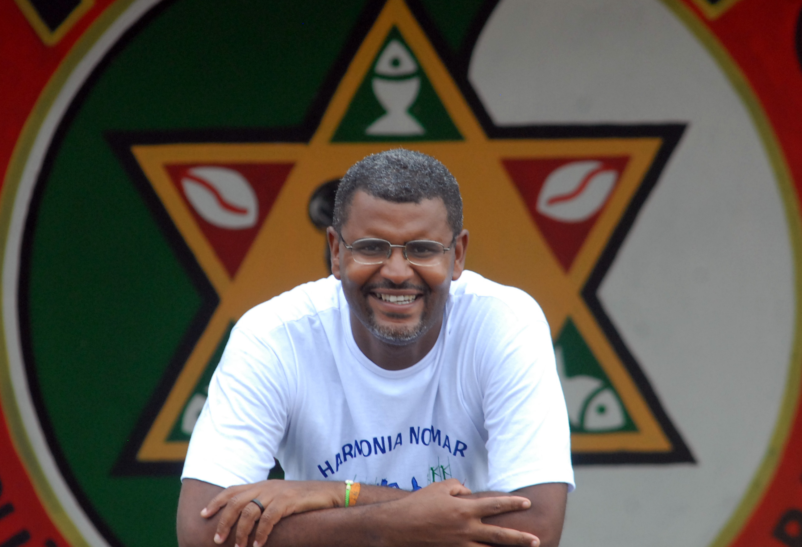 Dirigente do Bloco Afro Malê Debalê Carlos Eduardo Carvalho, Salvador, Brazil